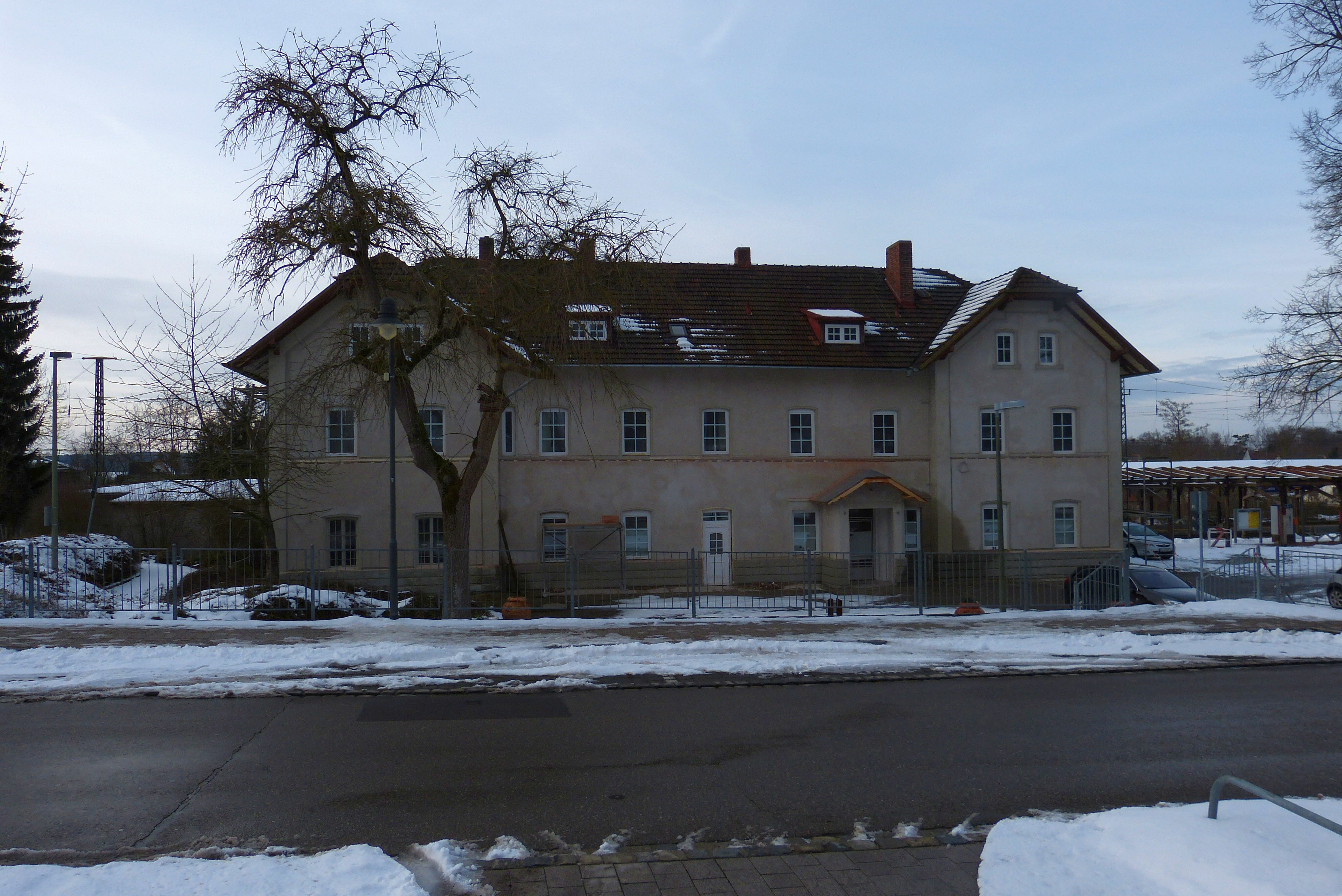 Der Bahnhof Westheim (Neusäß)